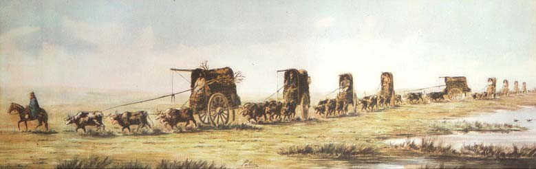 En caravanas como la que muestra el primer cuadro se transportaron los armamentos y pertrechos en general, que fueron enviados desde Buenos Aires a Mendoza. Importante esfuerzo que llevó adelante el Director Supremo de las Provincias Unidas, D Juan Martín de Pueyrredón, para apoyar la primera etapa del Plan Continental de San Martín.